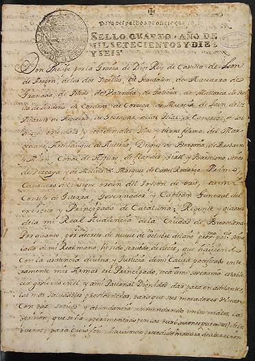 Real Cédula de 16-I-1716